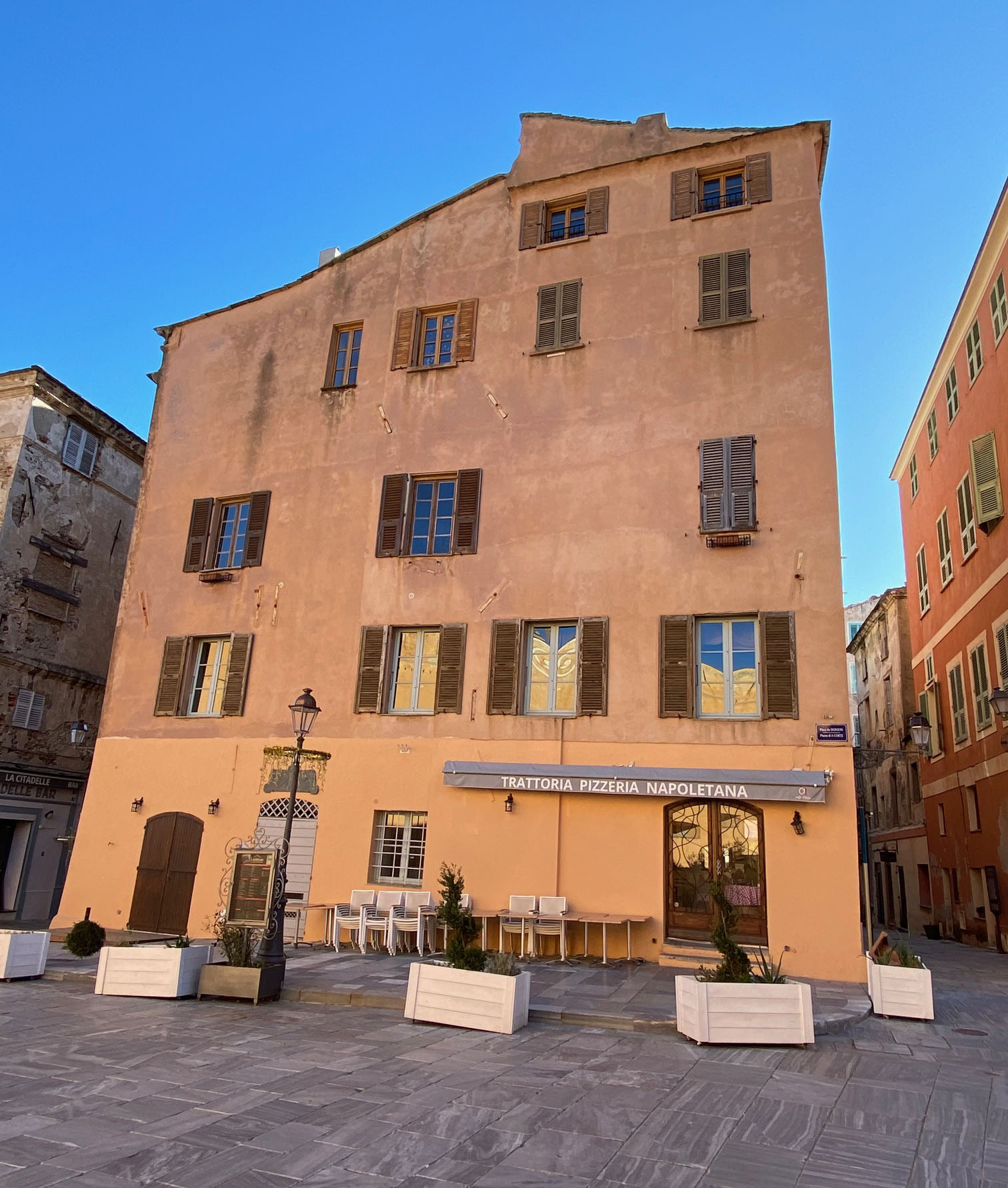 Corsu: A Casetta si trova piazza di Corte, in citatella di Bastia, Corsica. Hè stata custruita da a famiglia Tagliacarne